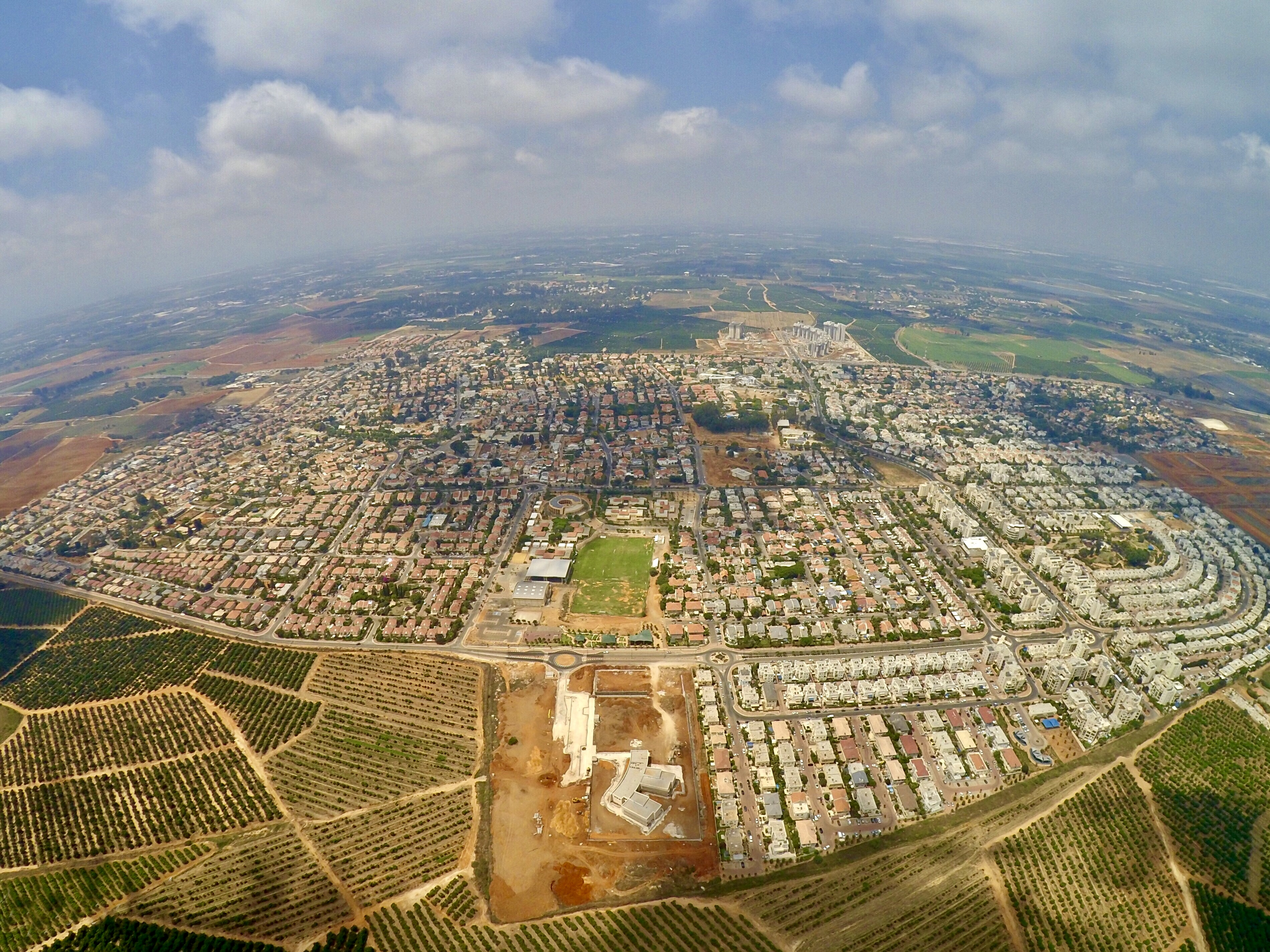 "כל הכפר" - כפר יונה ממבט הרחפן